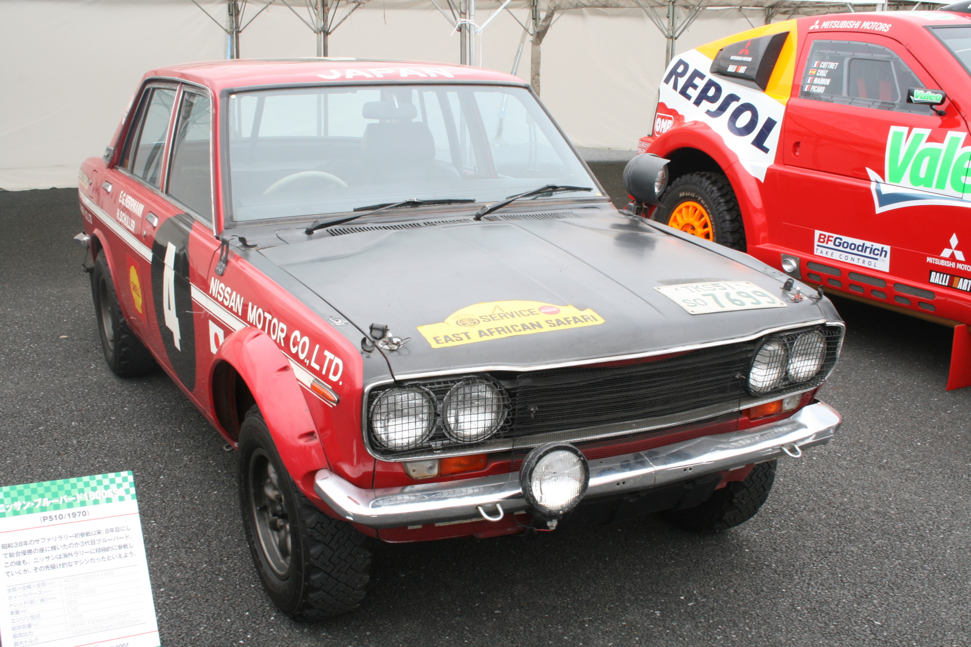 Nissan Bluebird